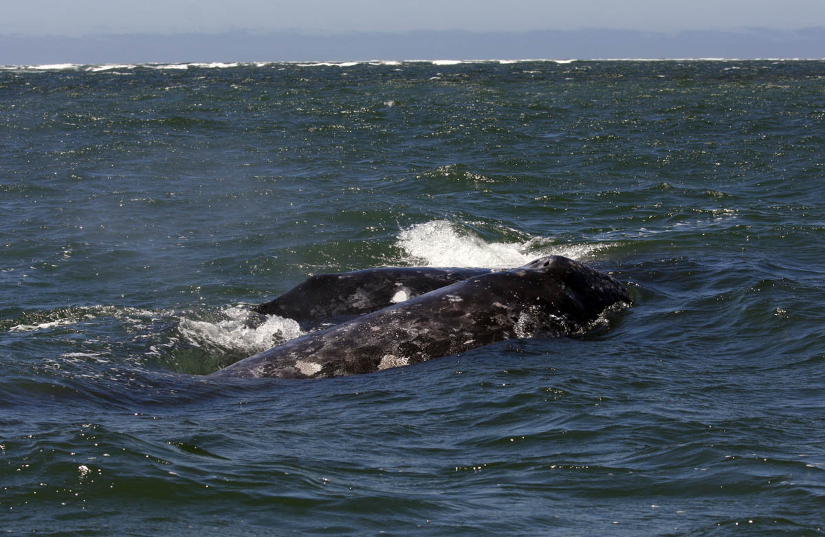 Grauwalkuh mit Kalb (Eschrichtius robustus), Baja California Sur